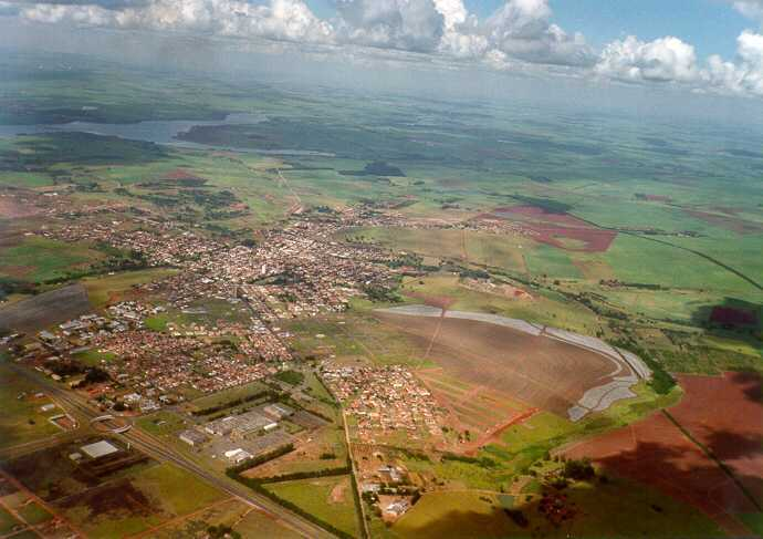 Foto aérea da cidade de Pederneiras - SP, produzida durante voo de asa-delta [1]